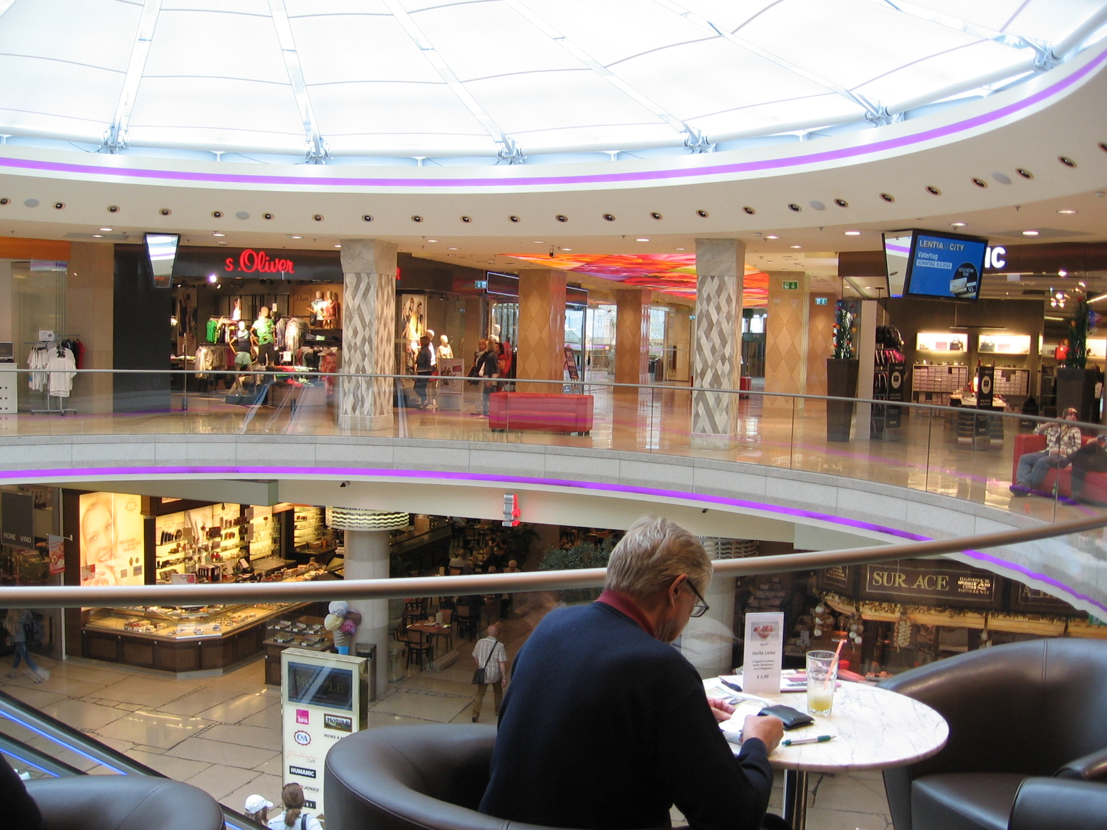 Die Einkaufsstraße im Lentia City Komplex in Linz an der Donau, Österreich